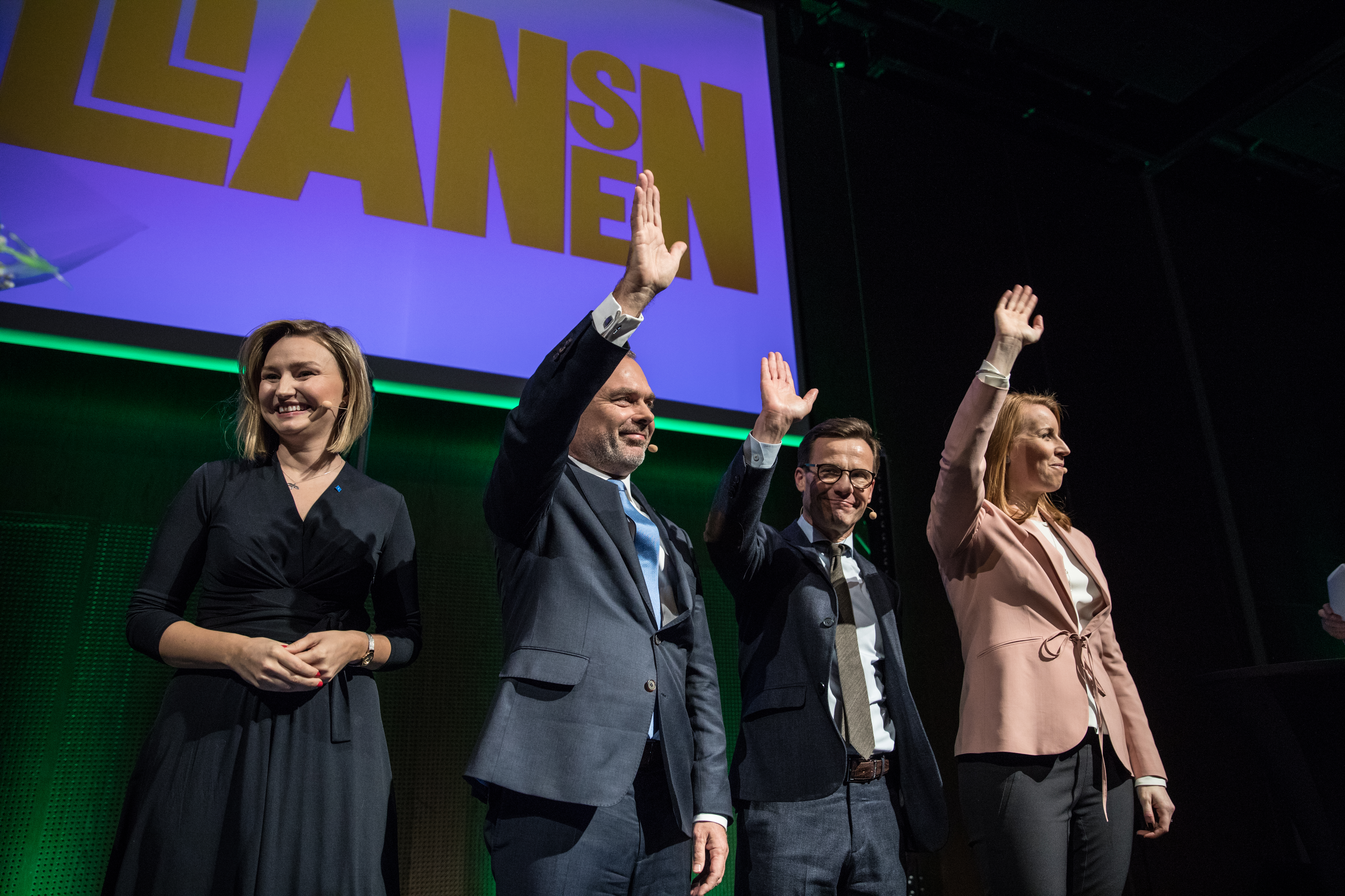 Centerpartiets kommundagar 2018